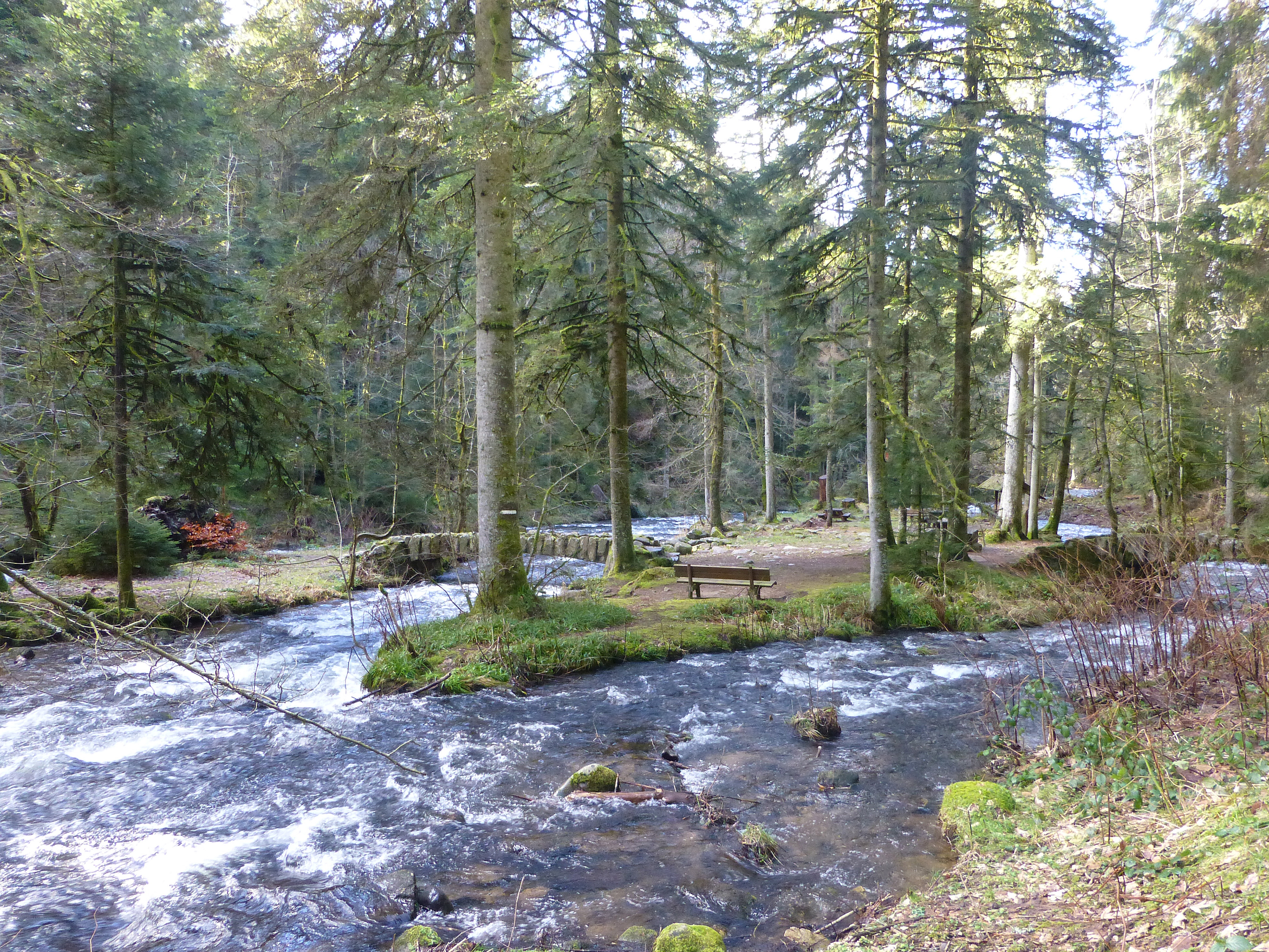 Les îles Marie-Louise sur la Vologne, entre Gérardmer et Kichompré (Vosges). Altitude : 660 m